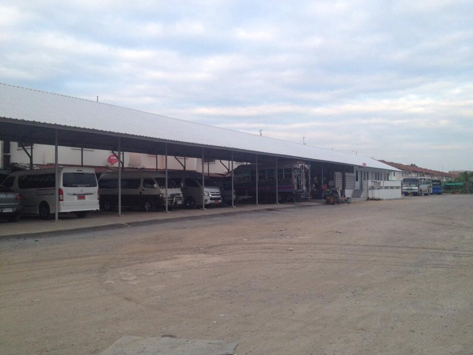 อาคารบ้านพักนักการ โรงช่างและโรงจอดรถที่ใช้ในราชการของโรงเรียน โรงเรียนสวนกุหลาบวิทยาลัย รังสิต